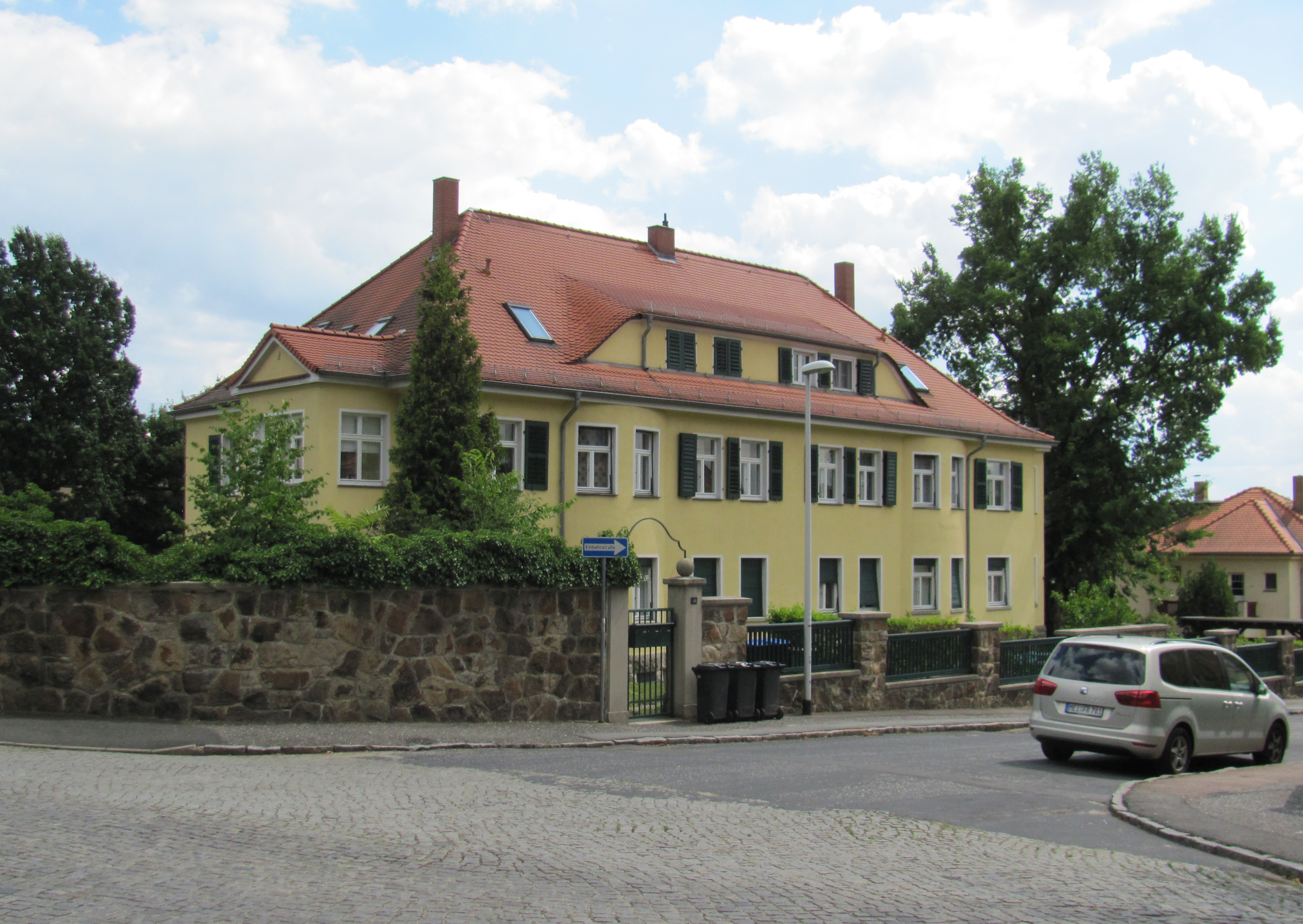 Radebeul-Niederlößnitz, Doppelwohnhaus Gröbastraße 14/16